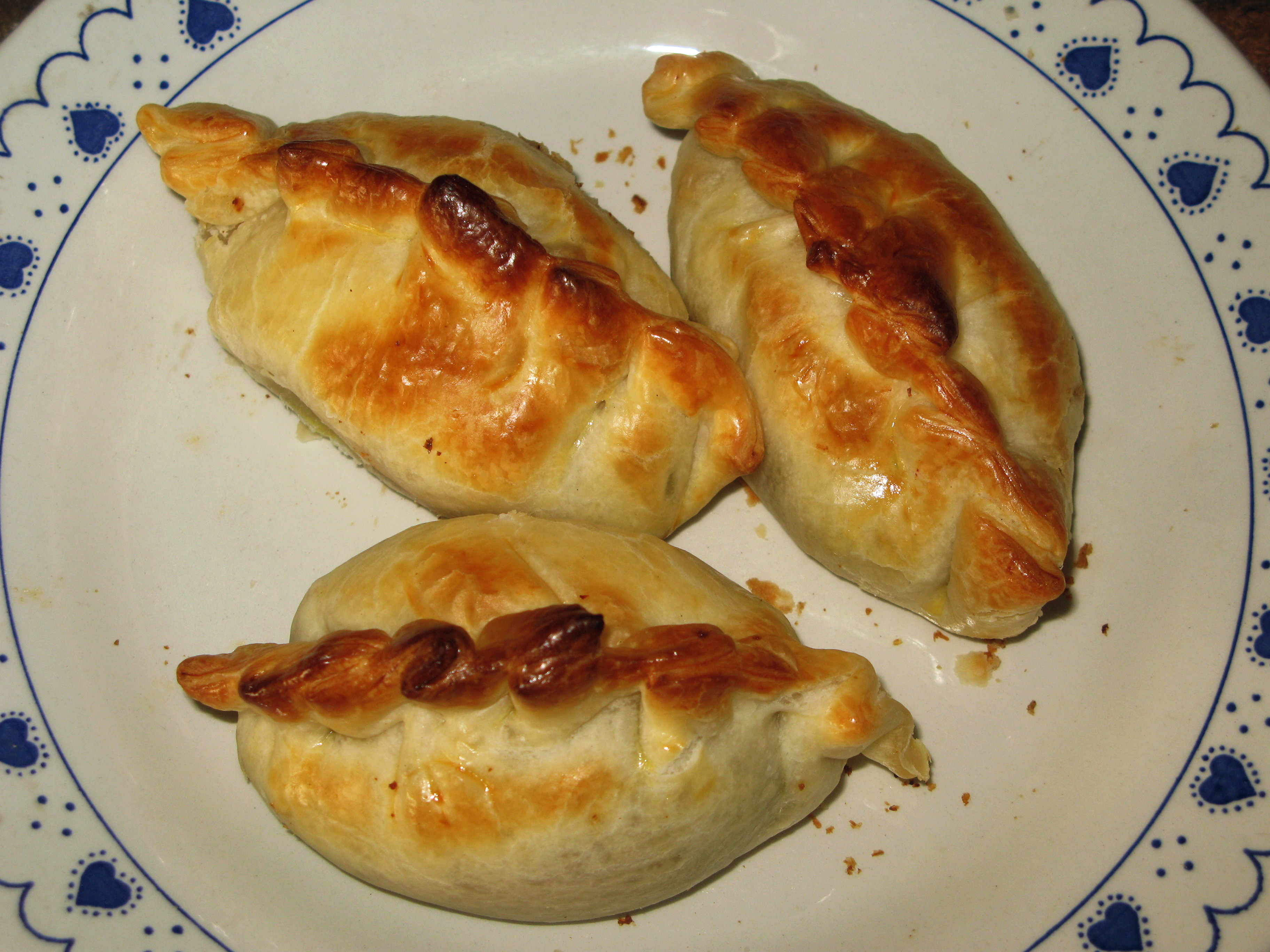 Empanadas cordobesas (Argentina) caseras